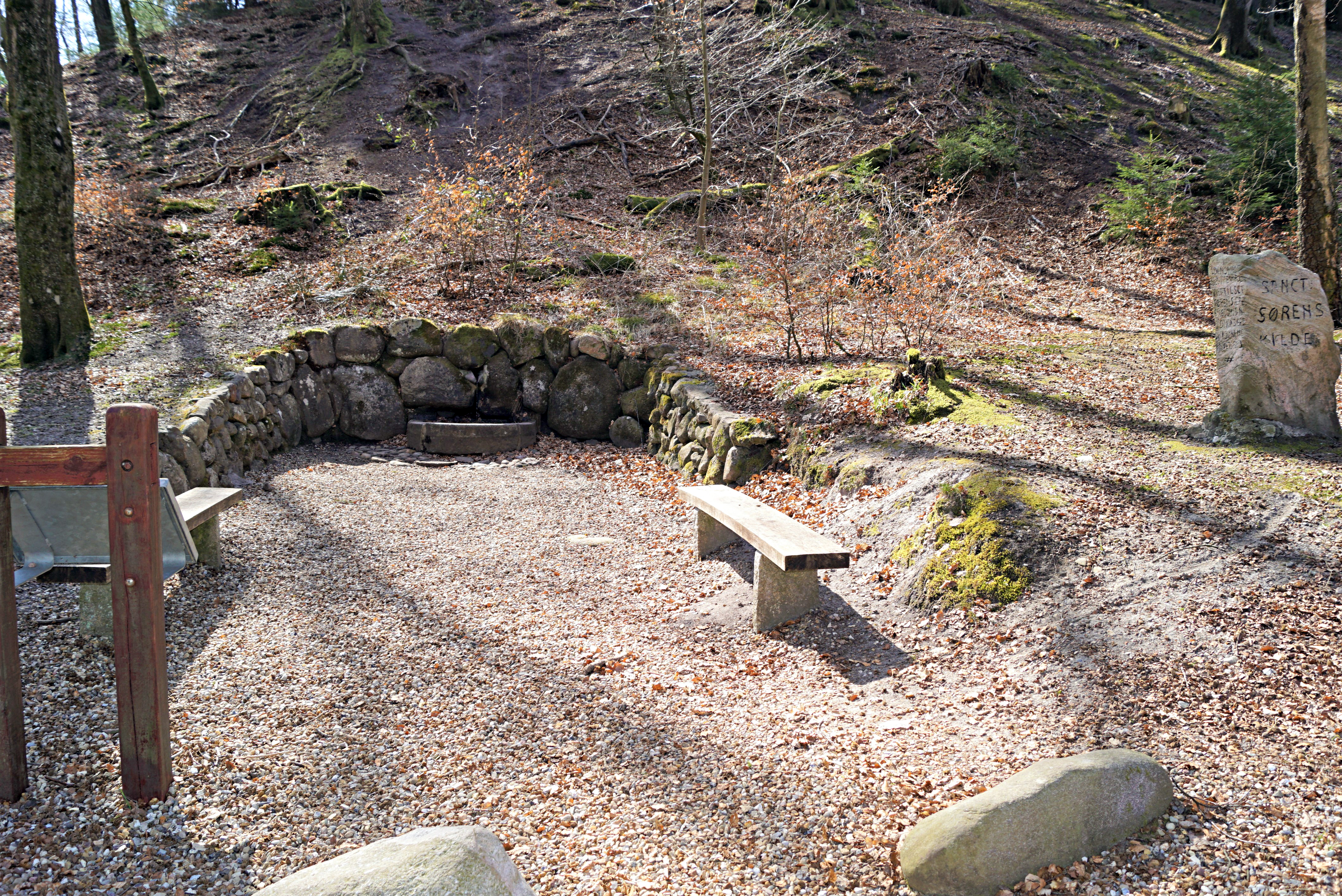 Skt Sørens Kilde er en helligkilde der ligger i Rye Sønderskov ved Gammel Rye